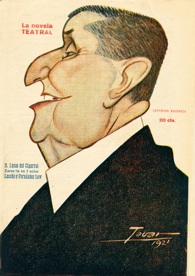 Caricatura de Ceferino Palencia.